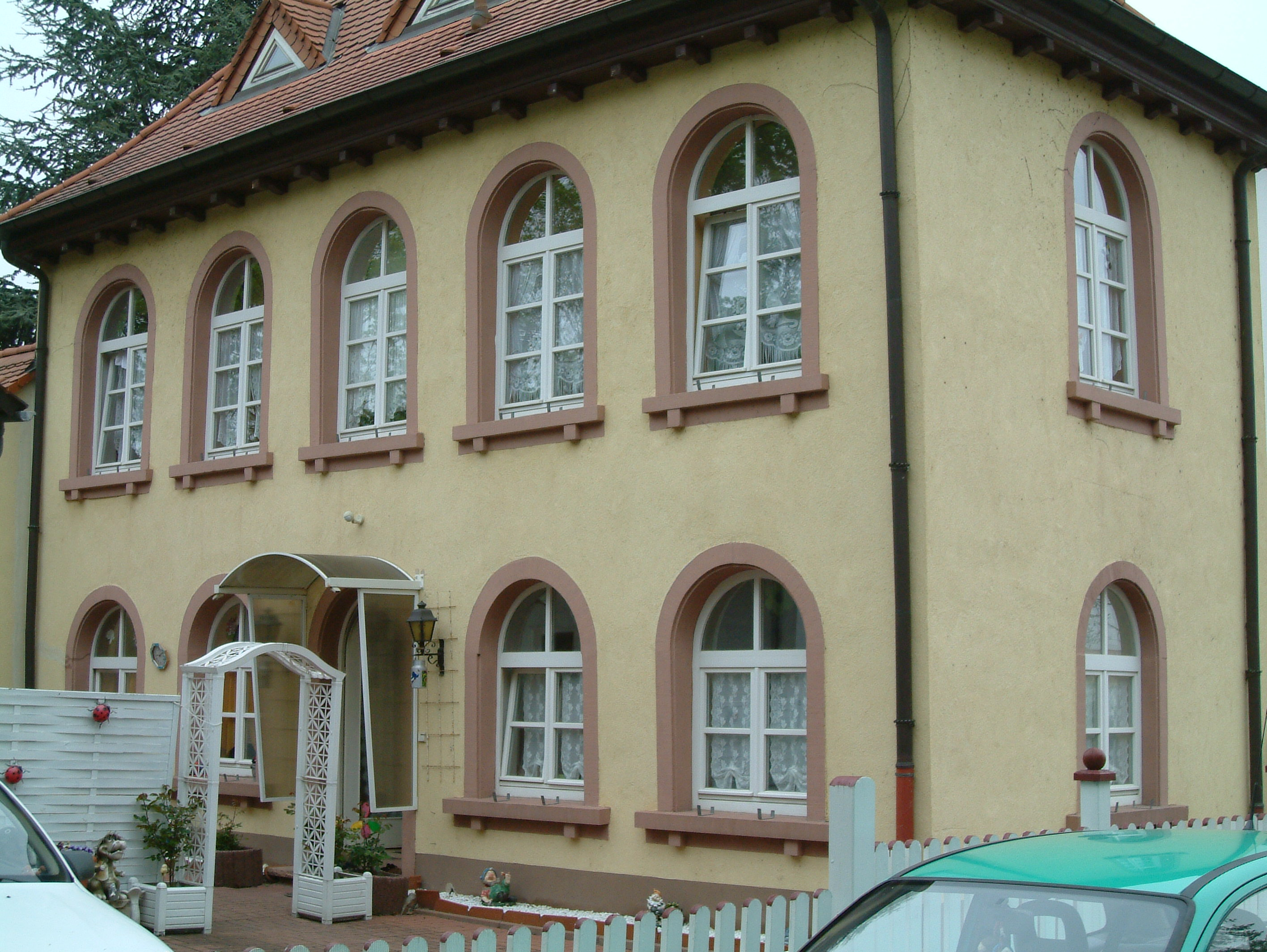 Badehaus der Gräfin von Brühl am Kellergarten zu Dirmstein, selbst fotografiert am 27.04.2006 und freigegeben durch Benutzer:Mundartpoet